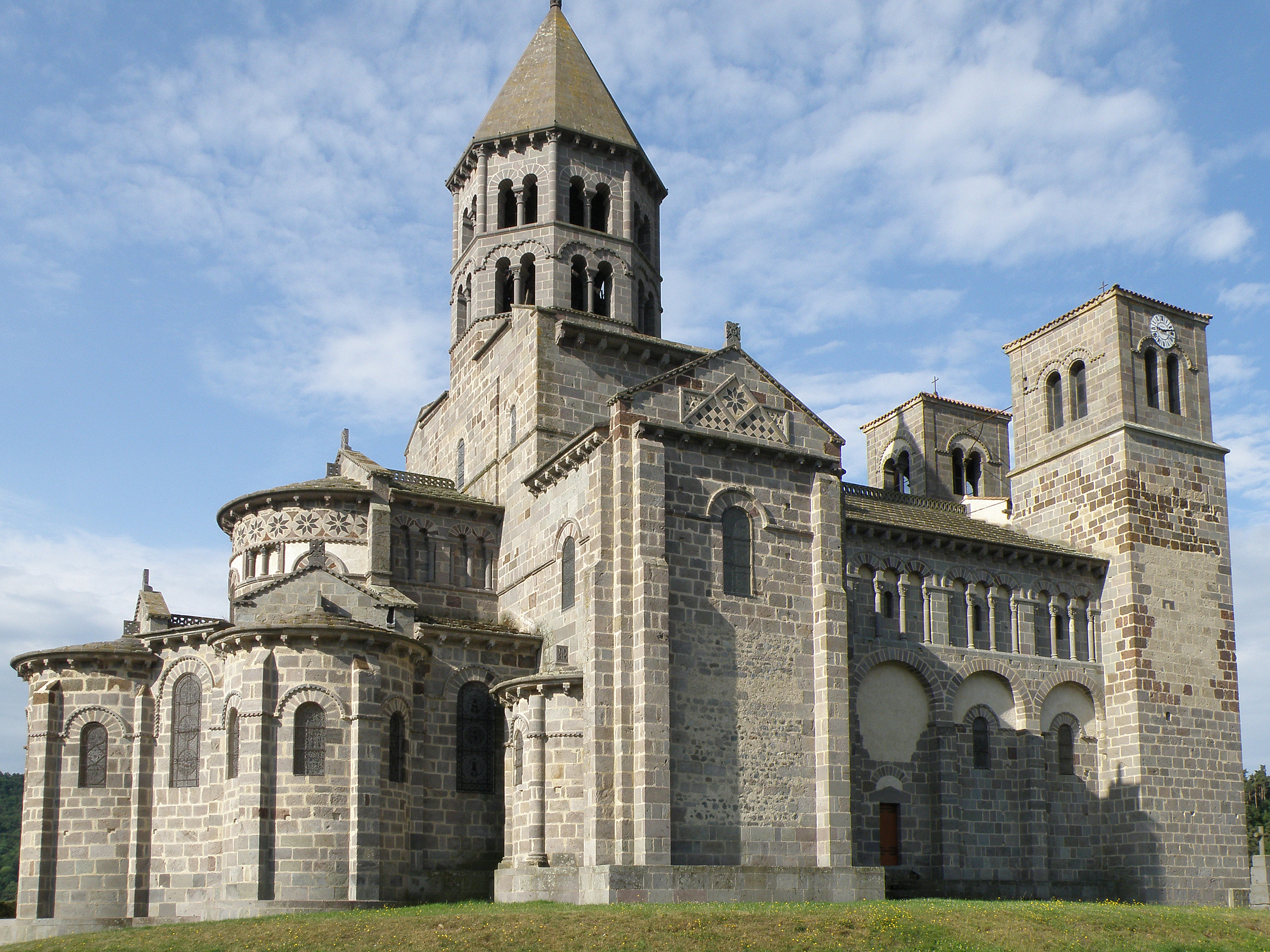 Saint-Nectaire, commune du Puy-de-Dôme (France, région Auvergne). Église Saint-Nectaire, sur le Mont Cornadore. Flanc nord.